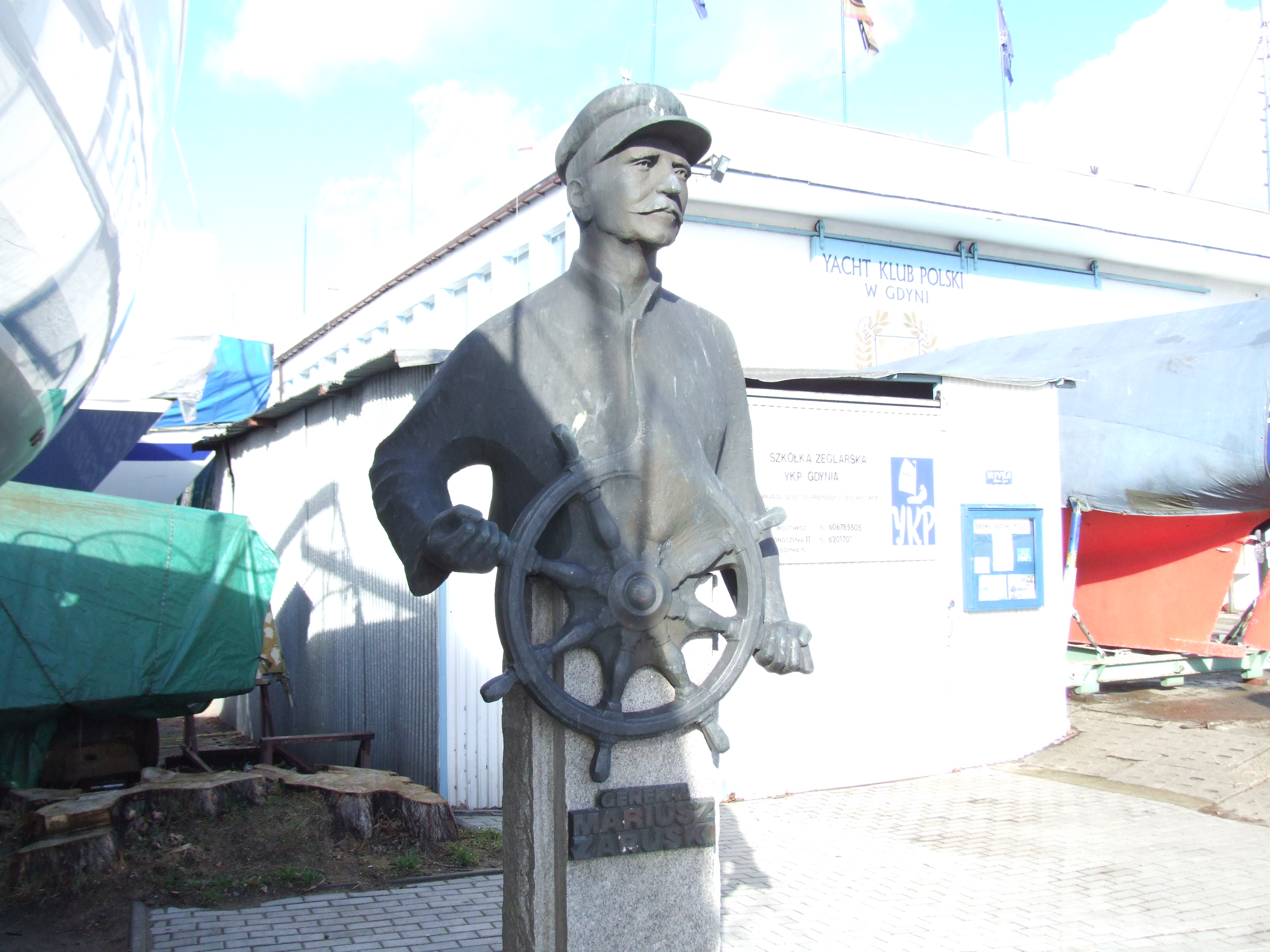 Pomnik generała Mariusza Zaruskiego - Gdynia